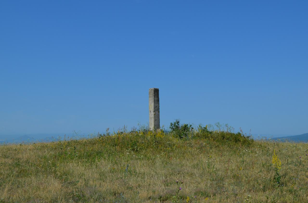 Поход на гору Лысую, 17.06.2019